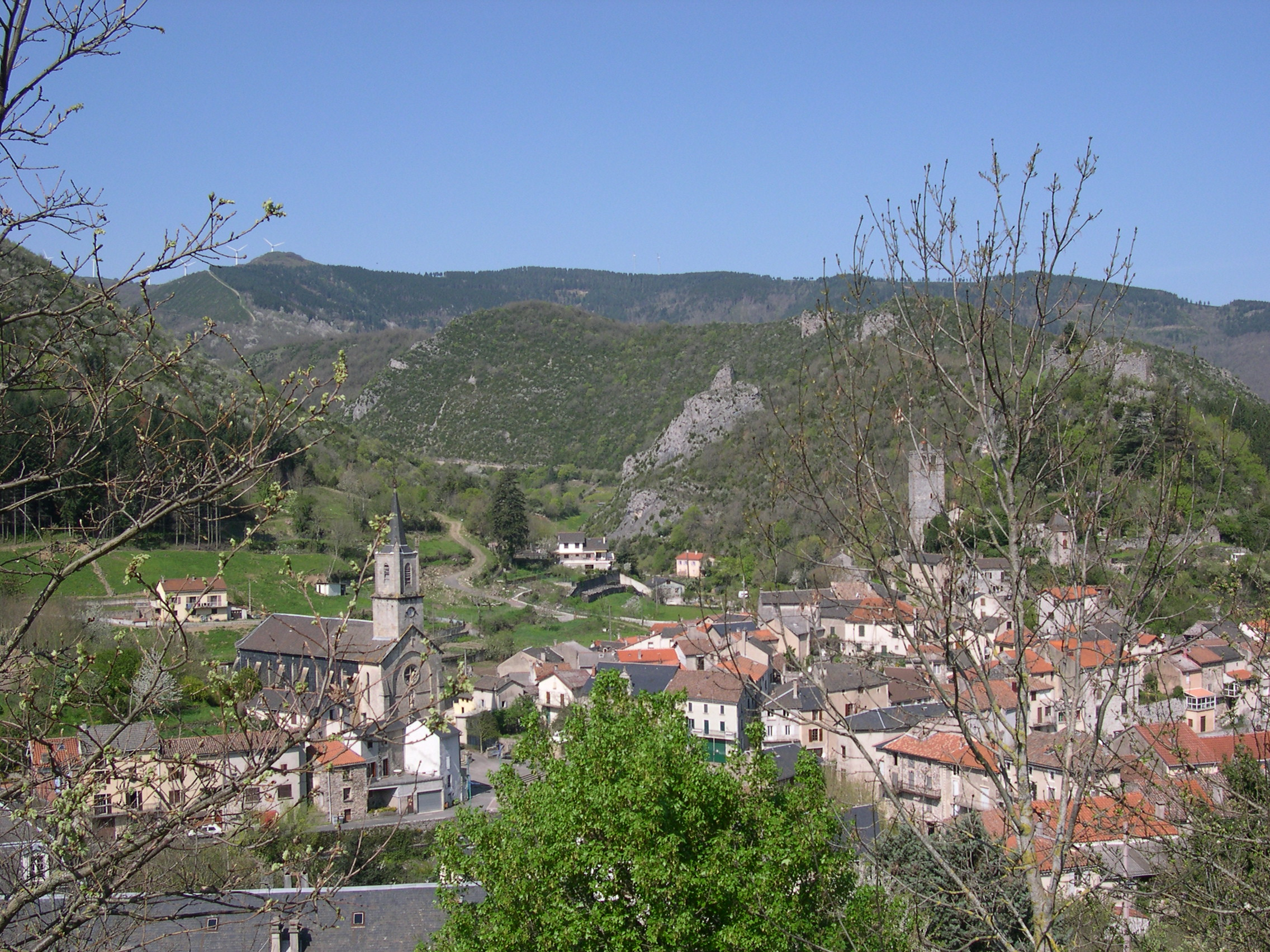 Brusque (Aveyron) - vue générale.